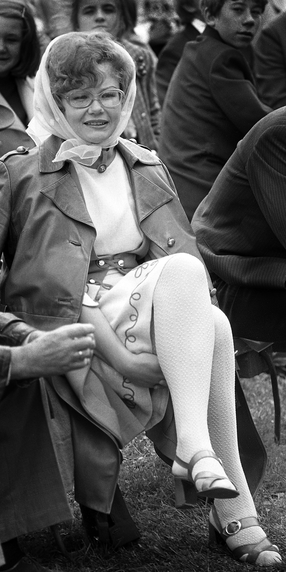 Heli Lääts Lauluväljakul 74